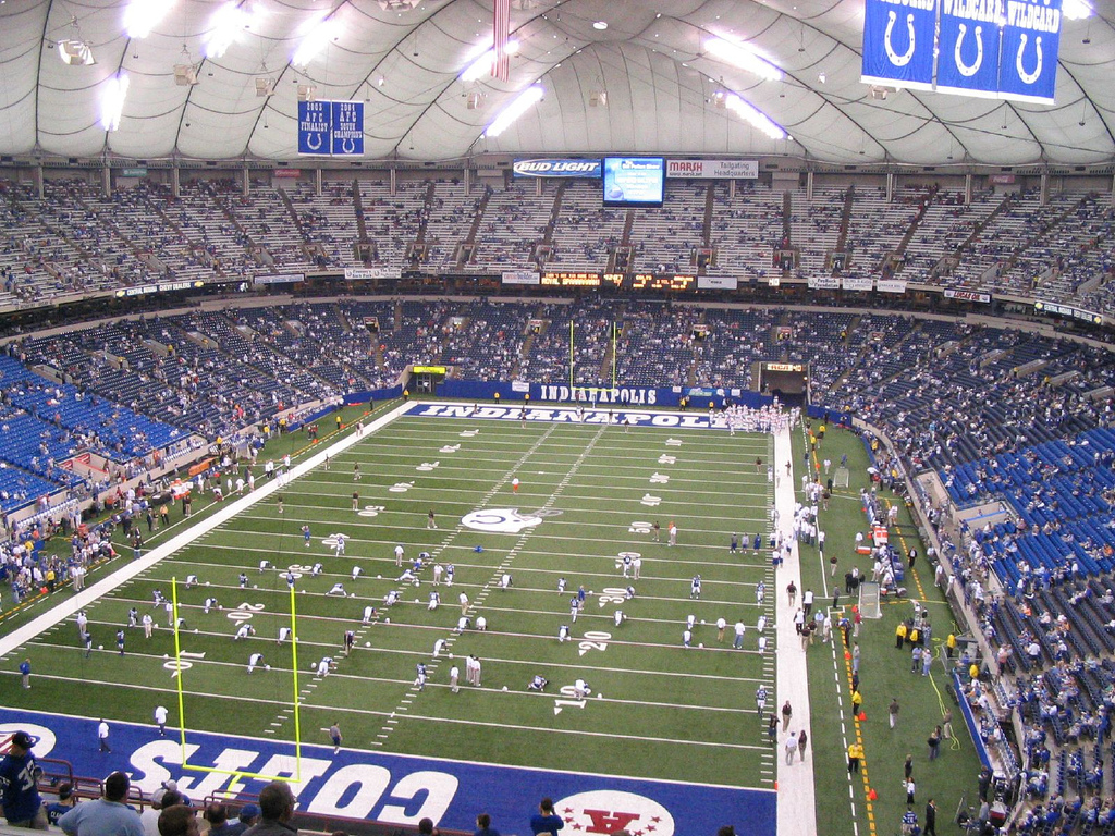 RCA Dome auteur : jglazer75